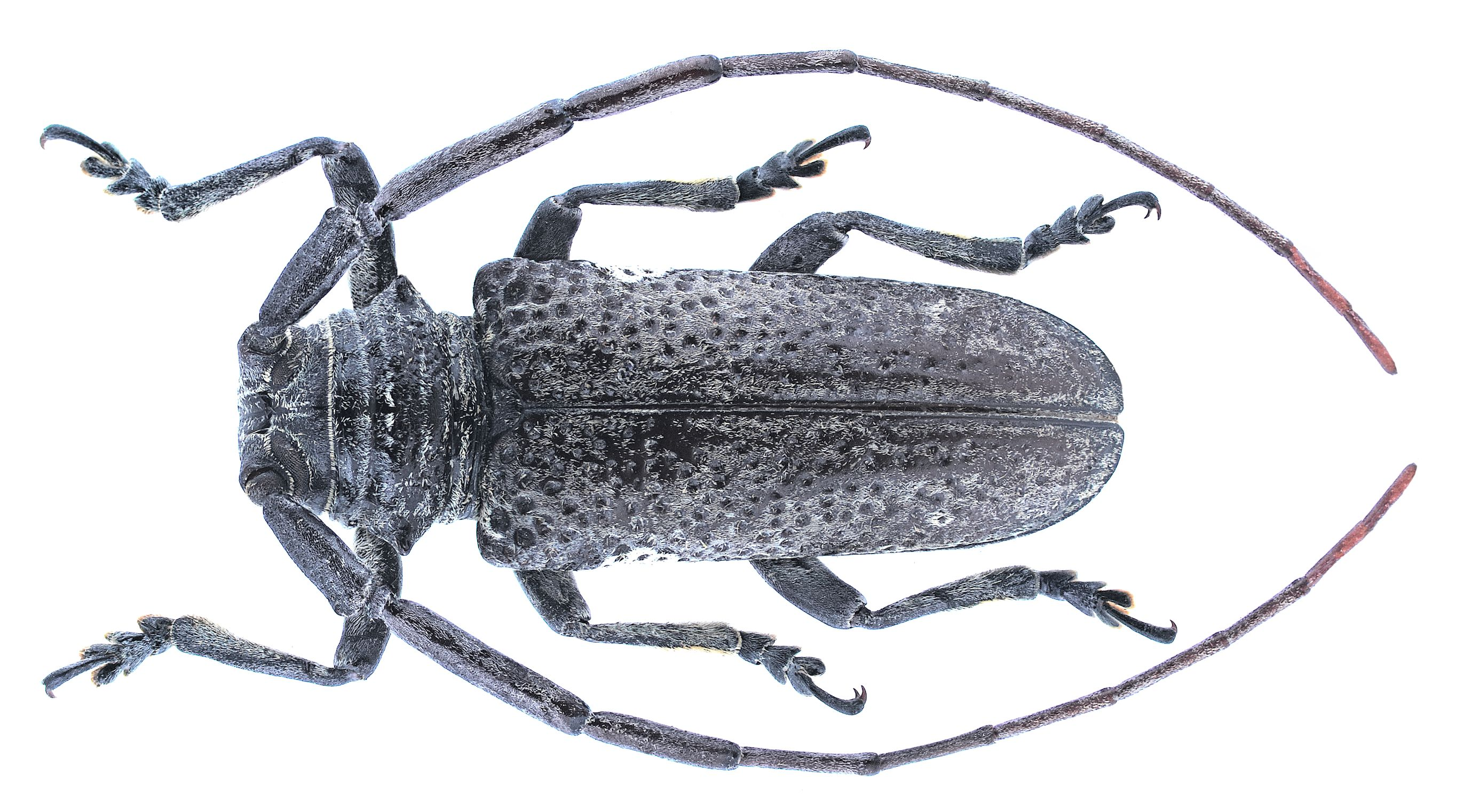 Familie: Cerambycidae Grösse: 19 mm Fundort: Namibia, Otjiwarongo, Waterberg leg. det. U.Schmidt, 1994 Foto: U.Schmidt, 2006